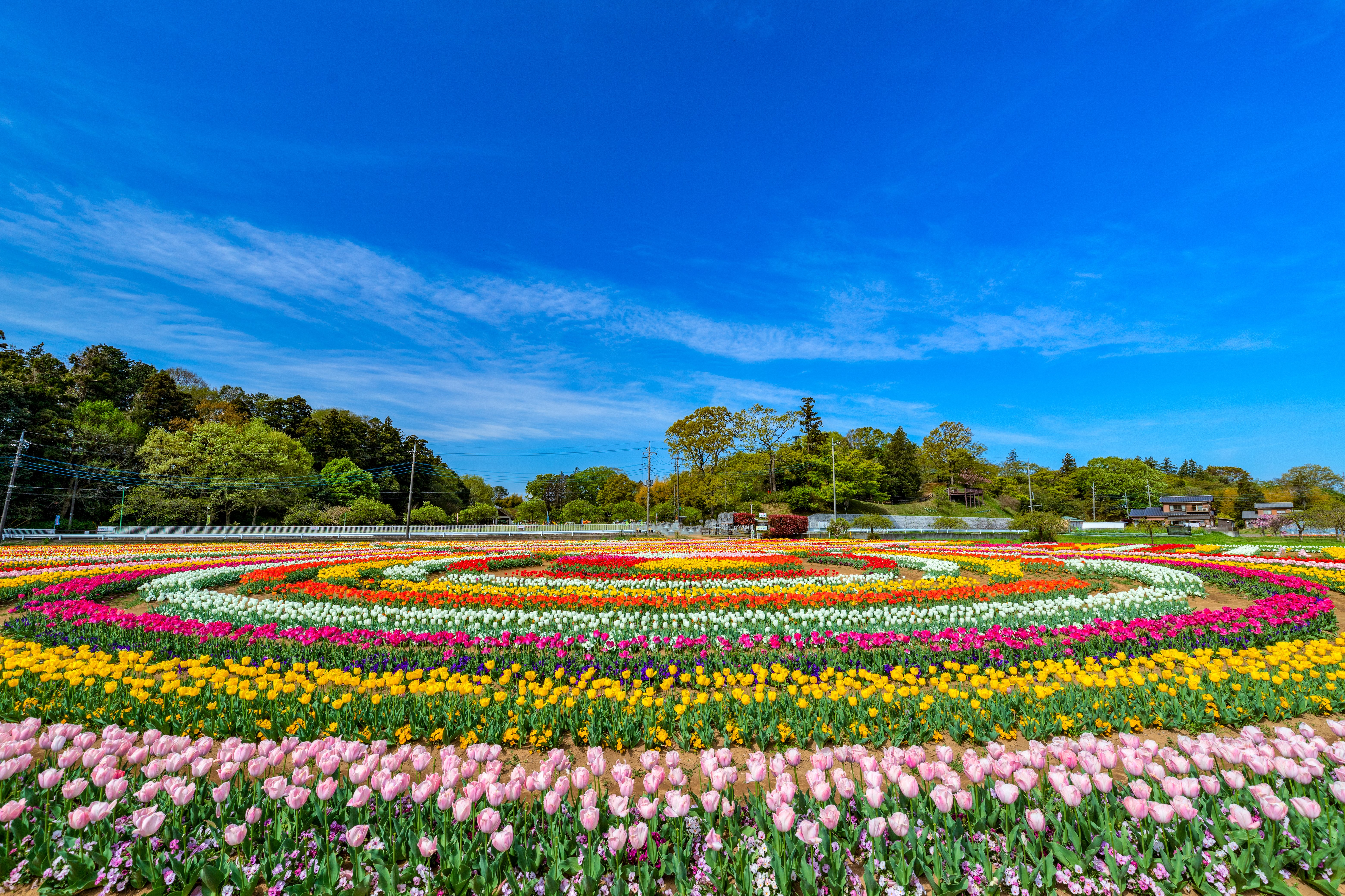 千葉県柏市、あけぼの山農業公園、チューリップ